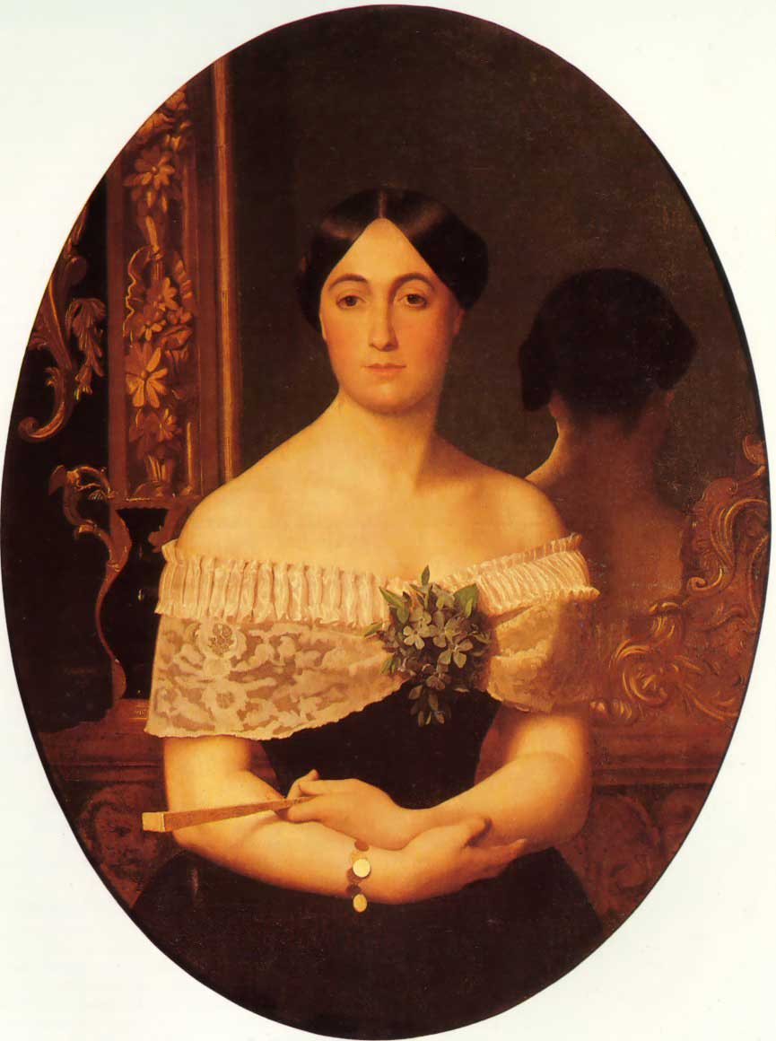 Portrait of a Lady par Jean-Léon Gérôme, portrait de Mary Ann Elisa Birch